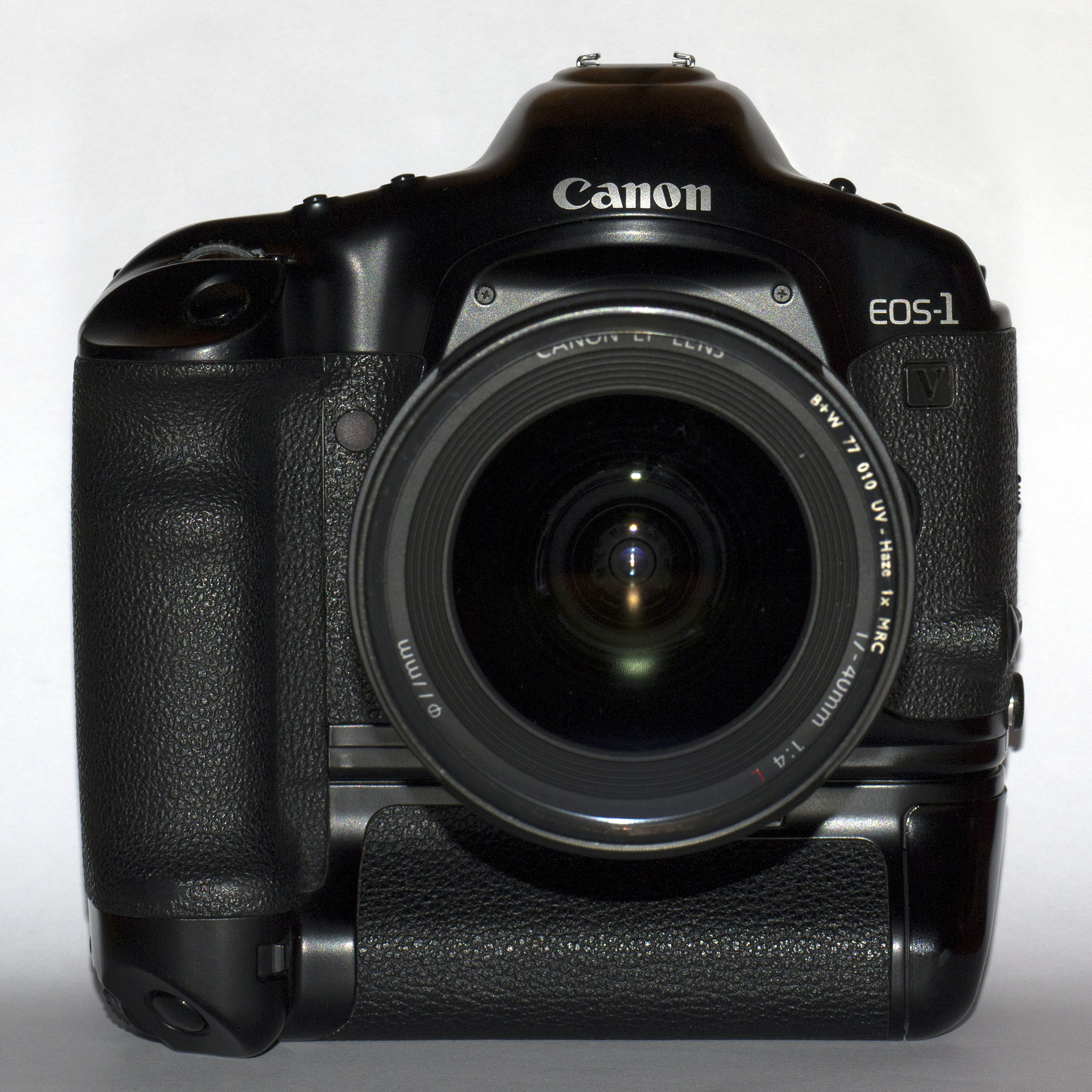 Canon EOS 1V HS mit EF 4/17-40mm Objektiv